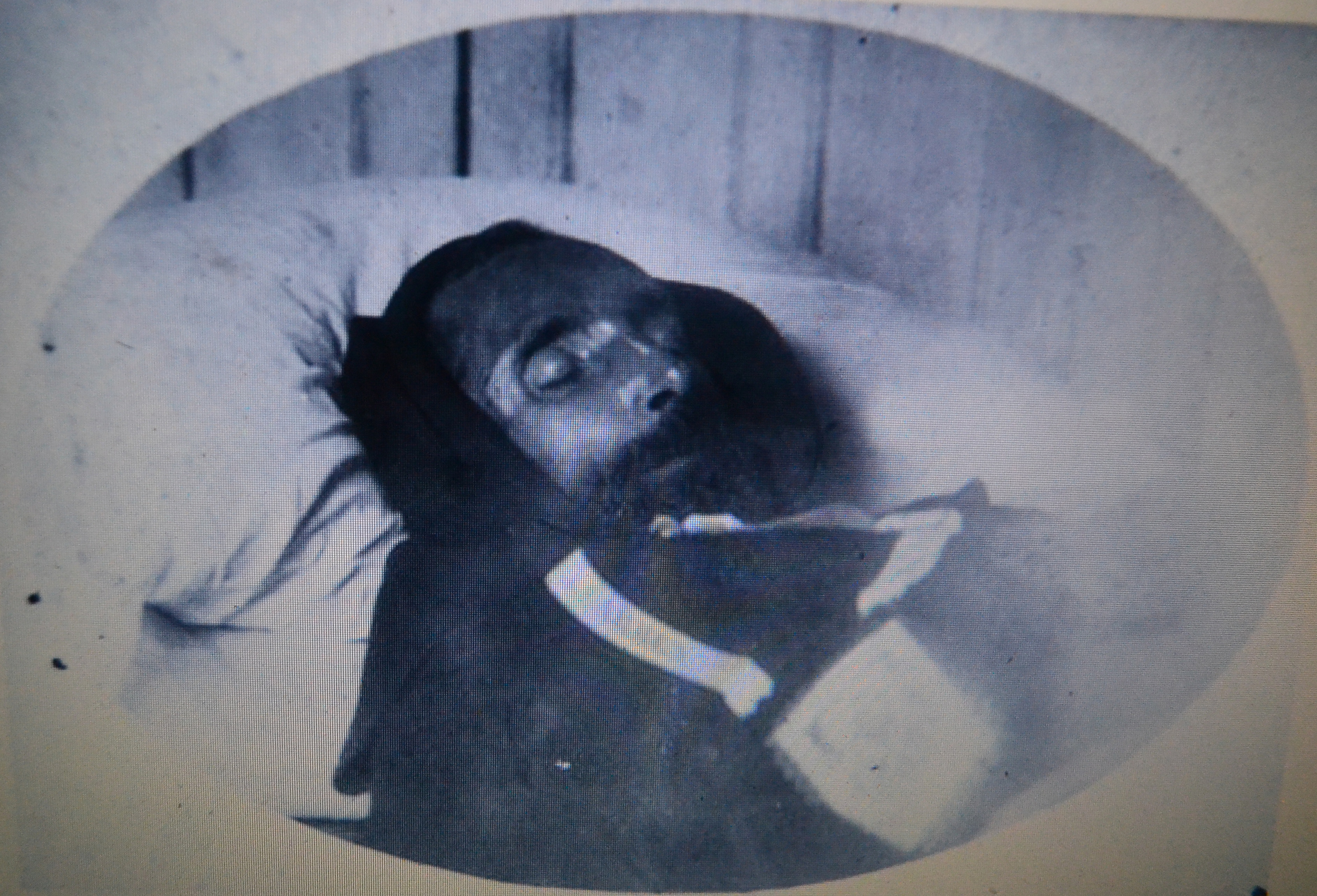 Sabin Arana Goiriren beila. 1903ko azaroa. Sukarrieta. Bizkaia, Euskal Herria. Sabino Arana Goiri's wake. November of 1903. Sukarrieta. Biscay, Basque Country.